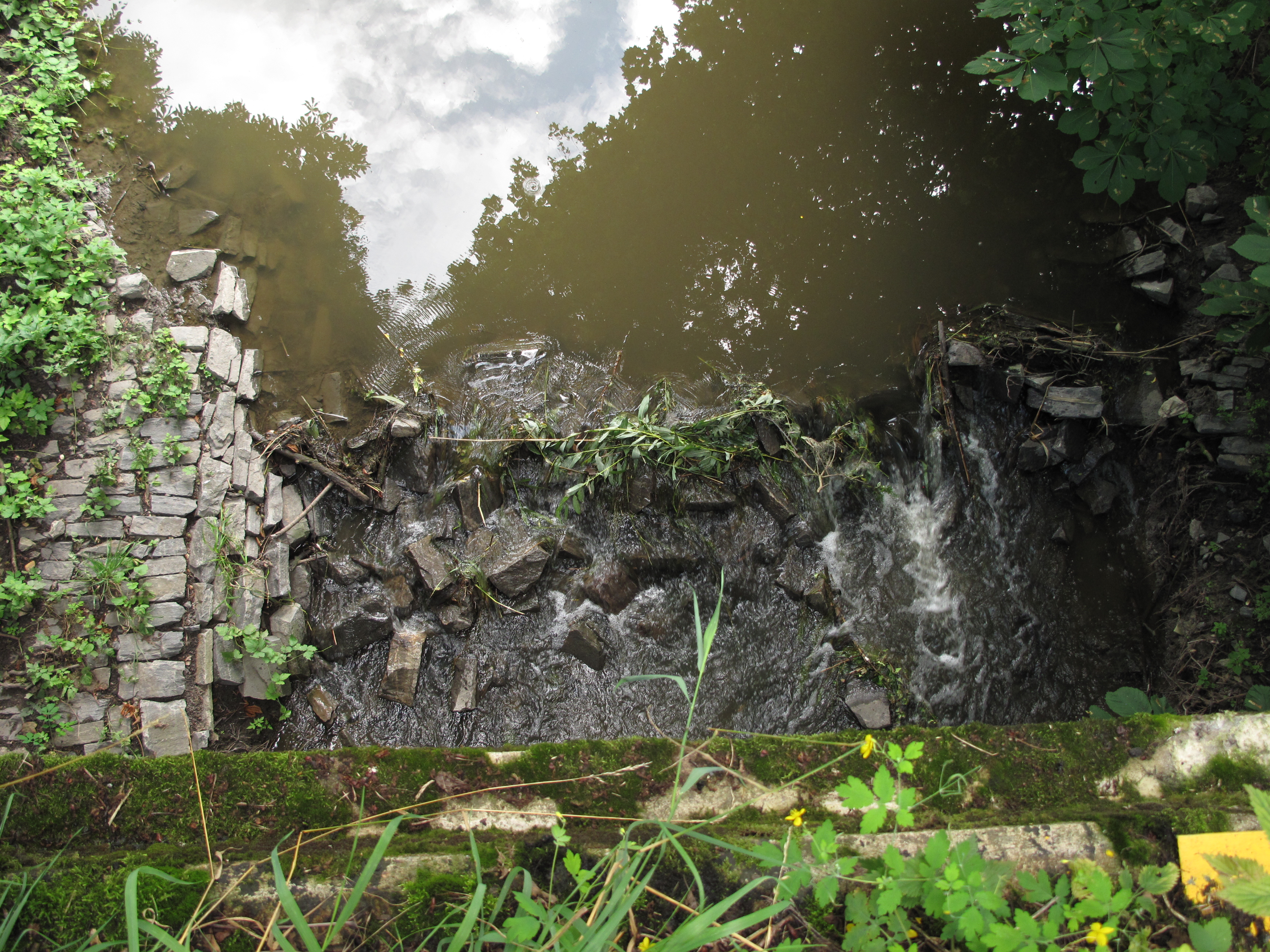 Štítarský potok. Česká republika.